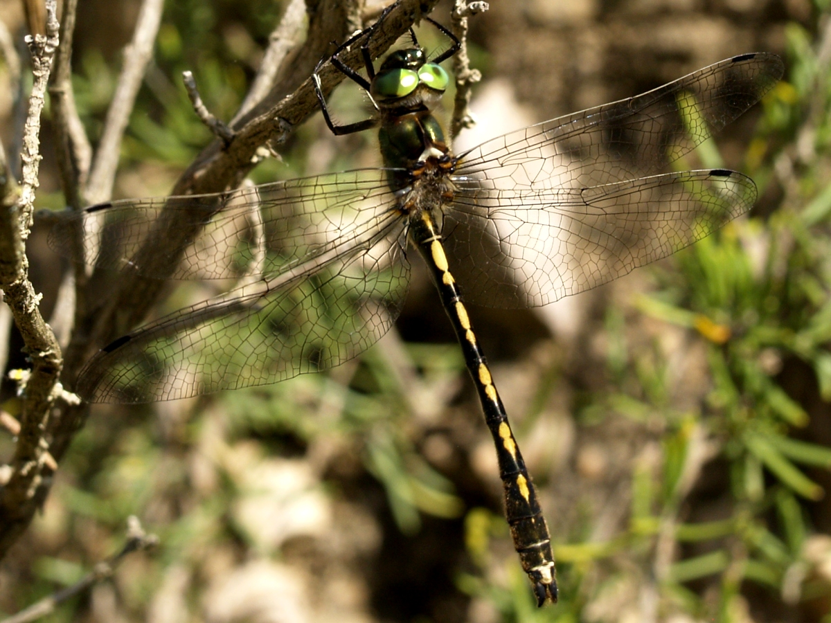 Oxygastra curtisii mascle